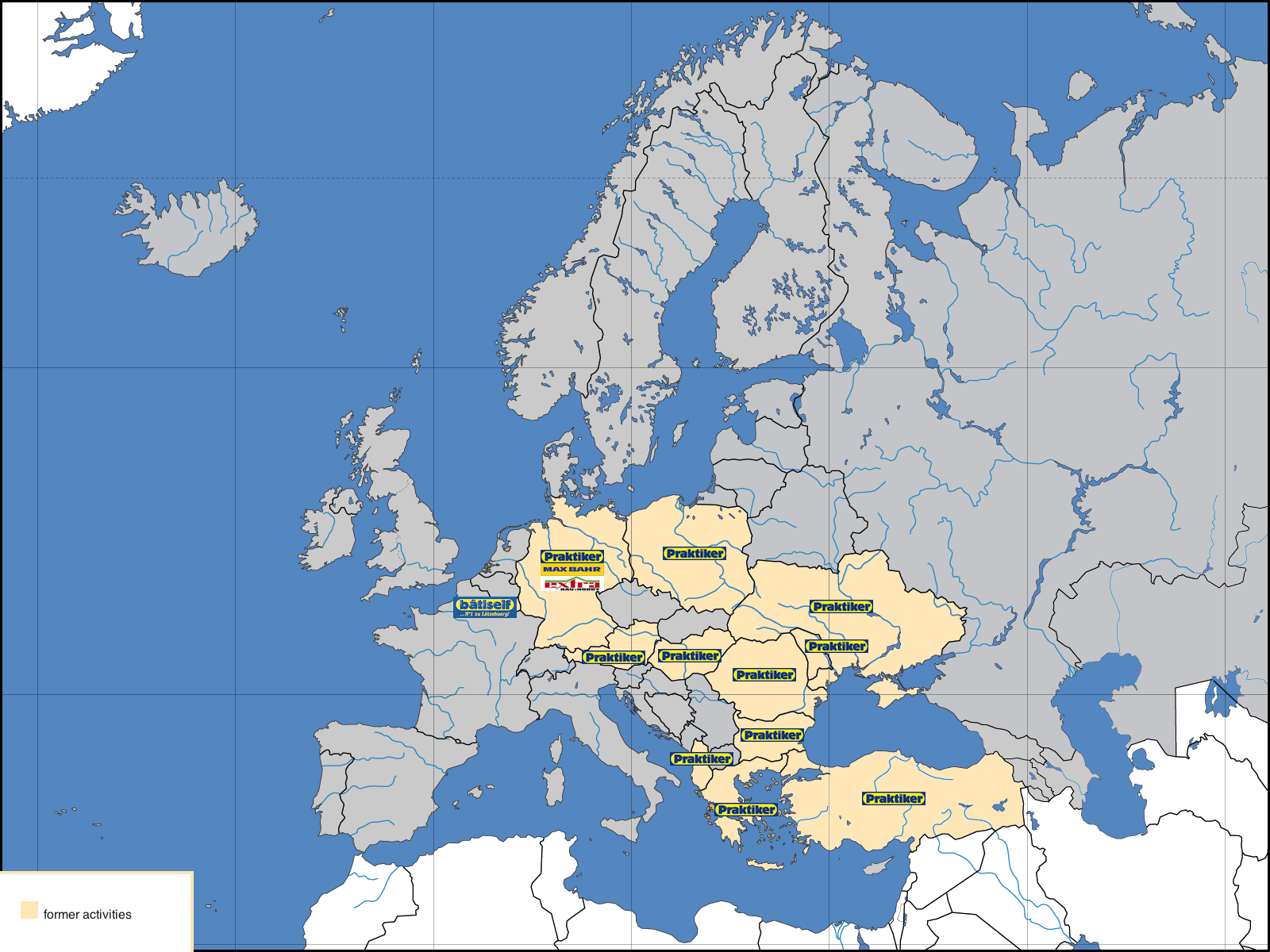 Praktiker locations